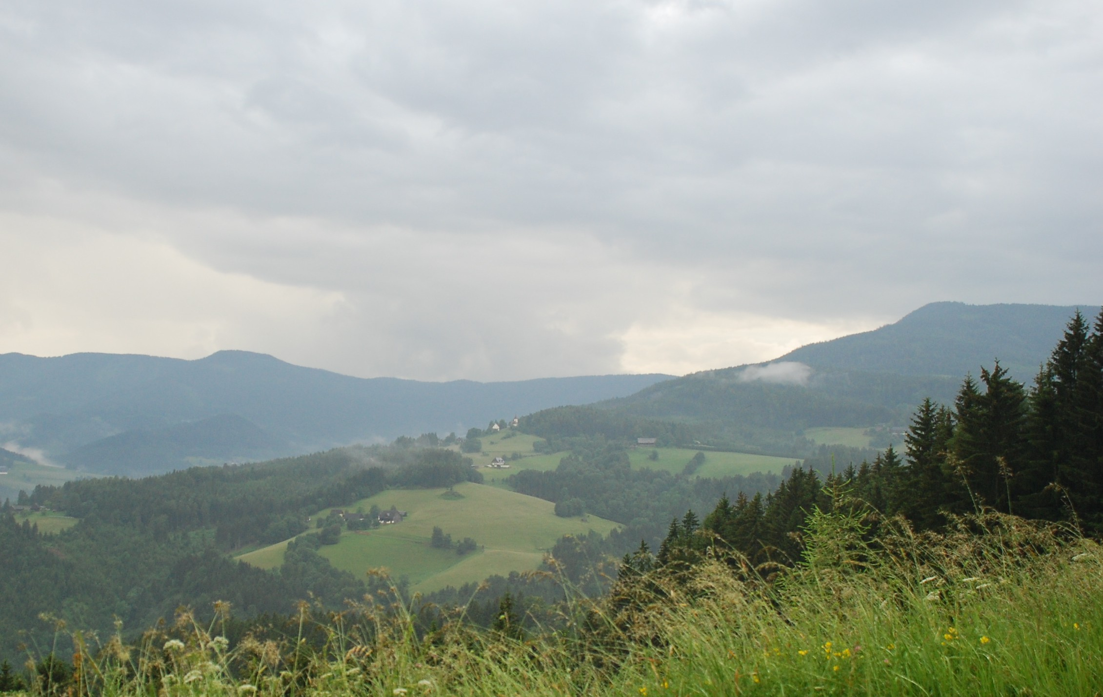 St. Oswald in Freiland auf dem Höhenzug des Schwarzkogels (Wolfsrücken), rechts Schwarzkogel-Gipfelkuppe. Im Tal dahinter (dunkel) Pöschlkogel, darüber Stoffkogel